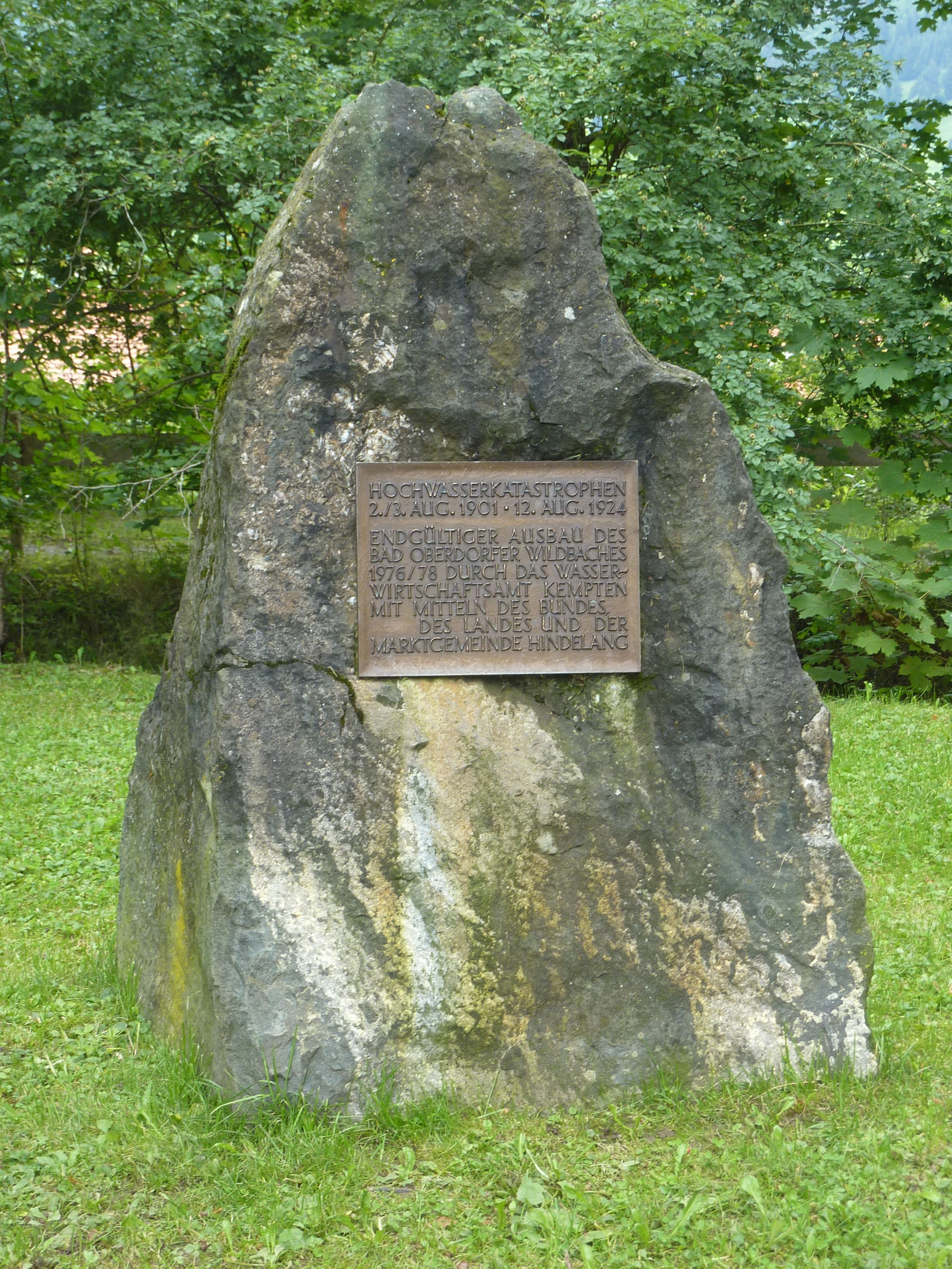 Erinnerung an Hochwasserkatastrophen in Bad Oberdorf, Schanzpark